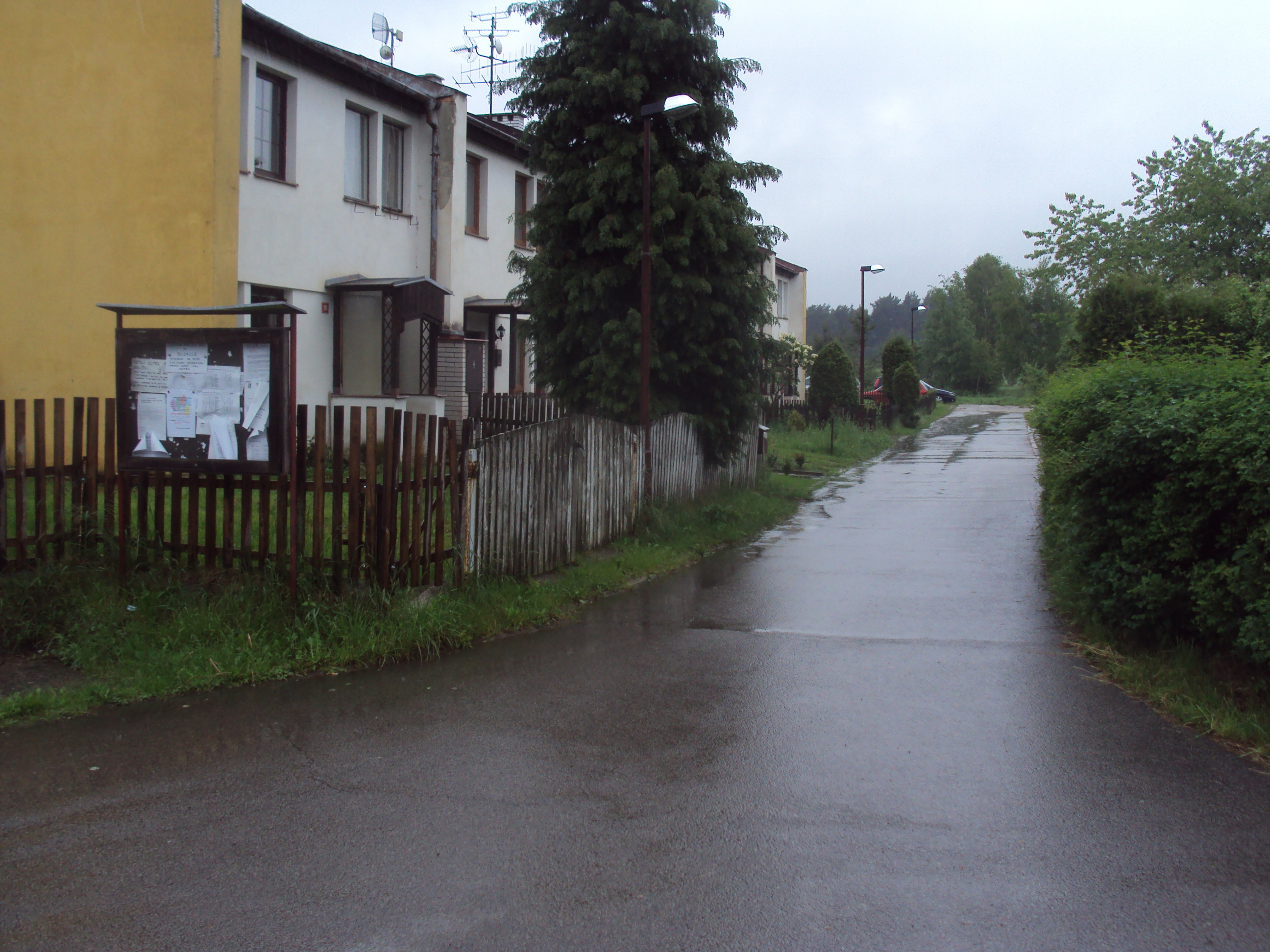 Česky: Řadové domky ve Hvězdově